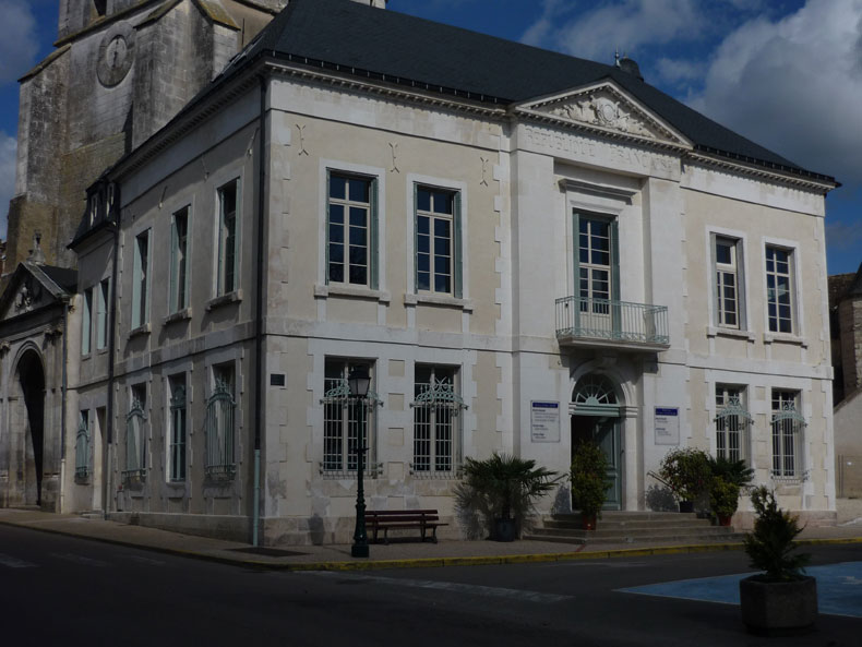 Mairie annexe qui accueille notamment la Maison du Tourisme et le Théâtre Perché